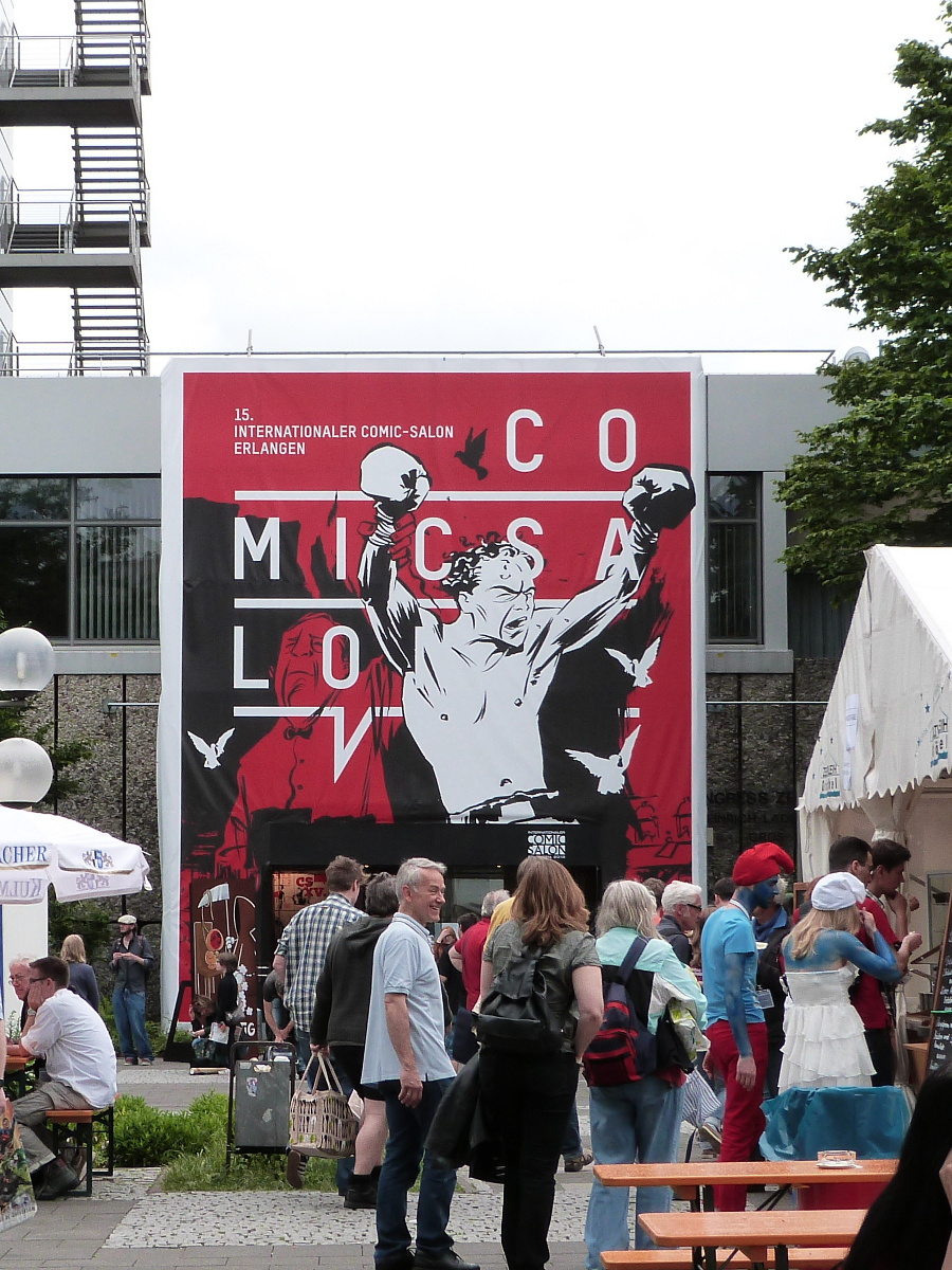 Comic-Salon Erlangen 2012, Eingang Heinrich Lades-Halle